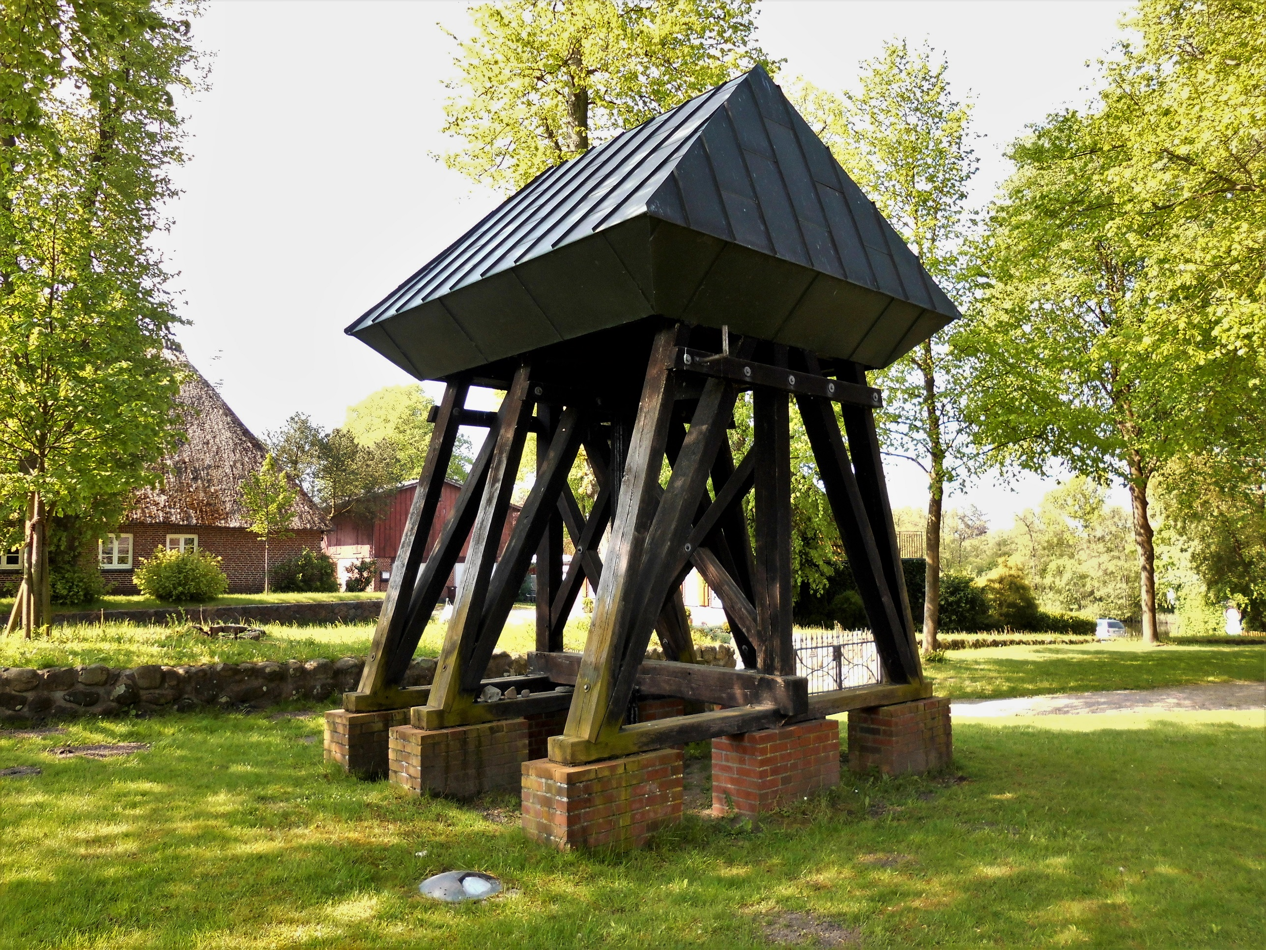 Der Glockenstapel der St.Georg-Kirche in der Gemeinde Flemhude bei Kiel.